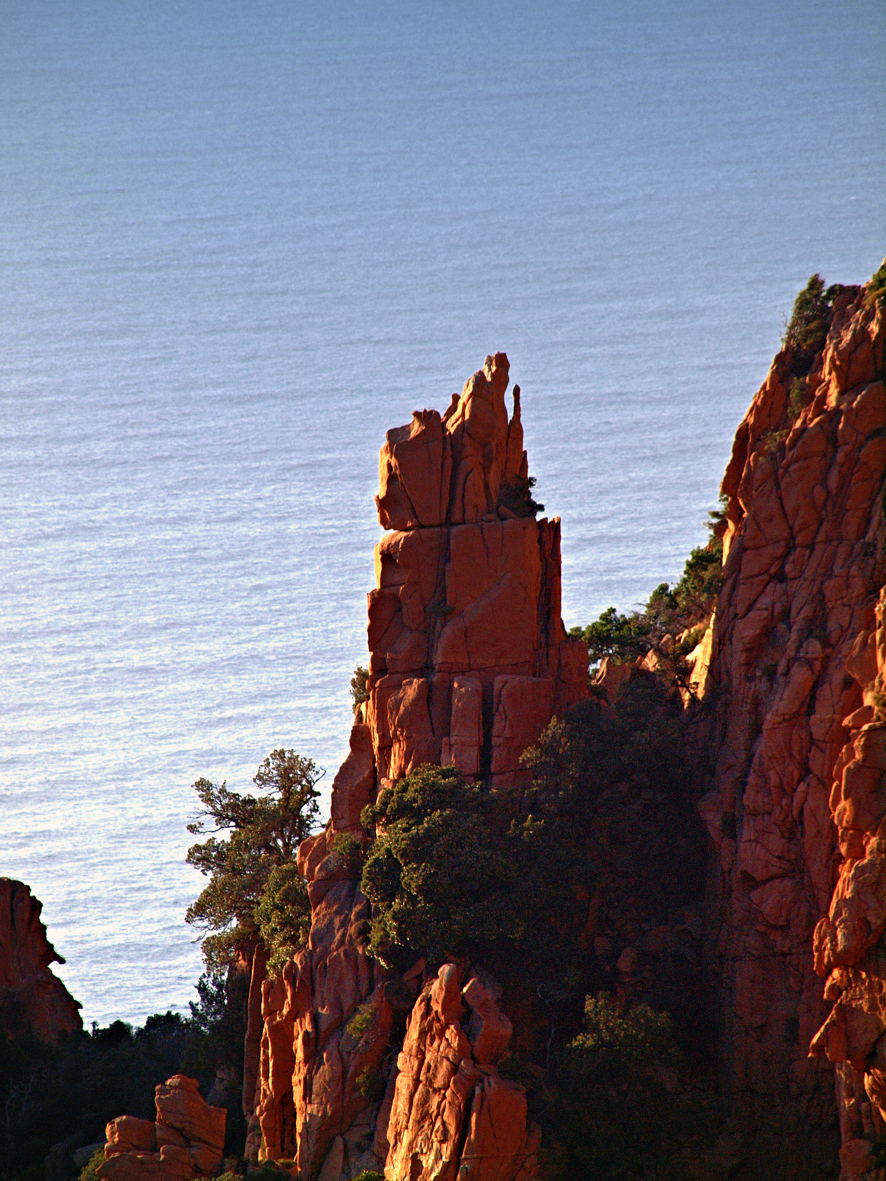 Piana, Ouest Corse (Corse) - Le "père" (the Father) des Calanche de Piana